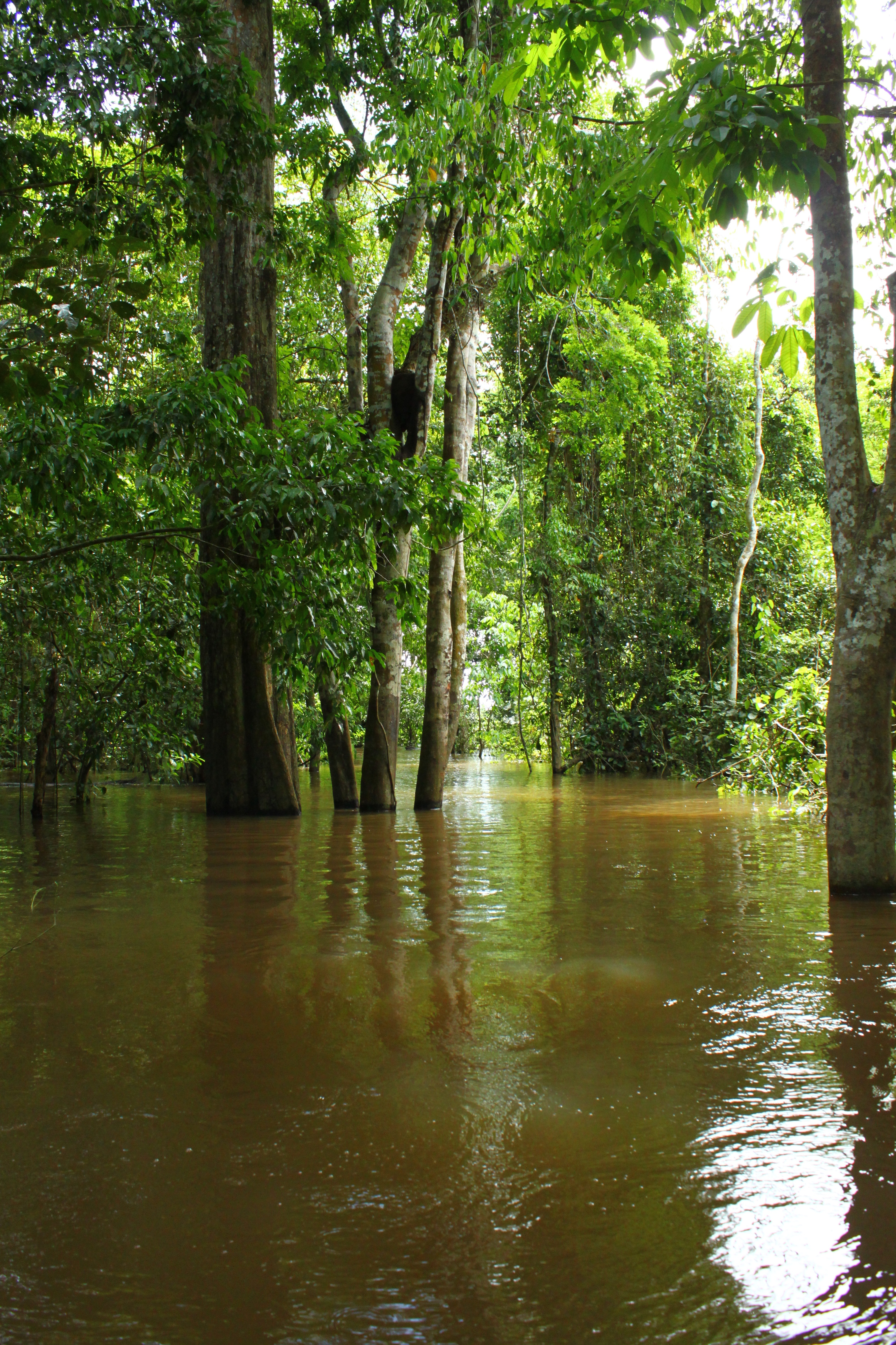 Árvores são parcialmente submersas pela água dos afluentes do Rio Negro, Parque Nacional do Jaú - Amazonas.